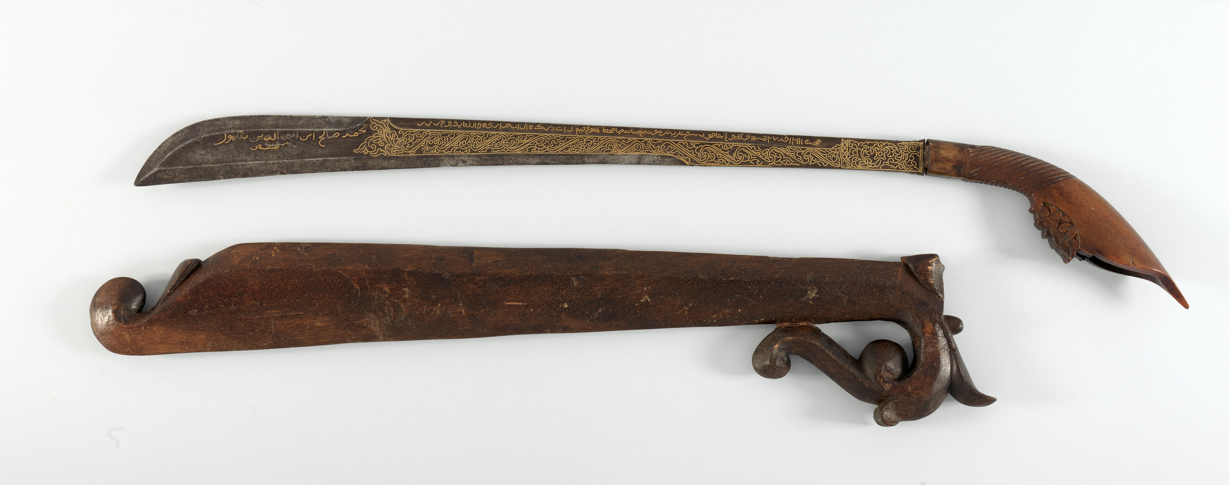 Malaysian, Kampung Payang and Sumatran, Aceh; Sword (Rudus) and scabbard; Swords